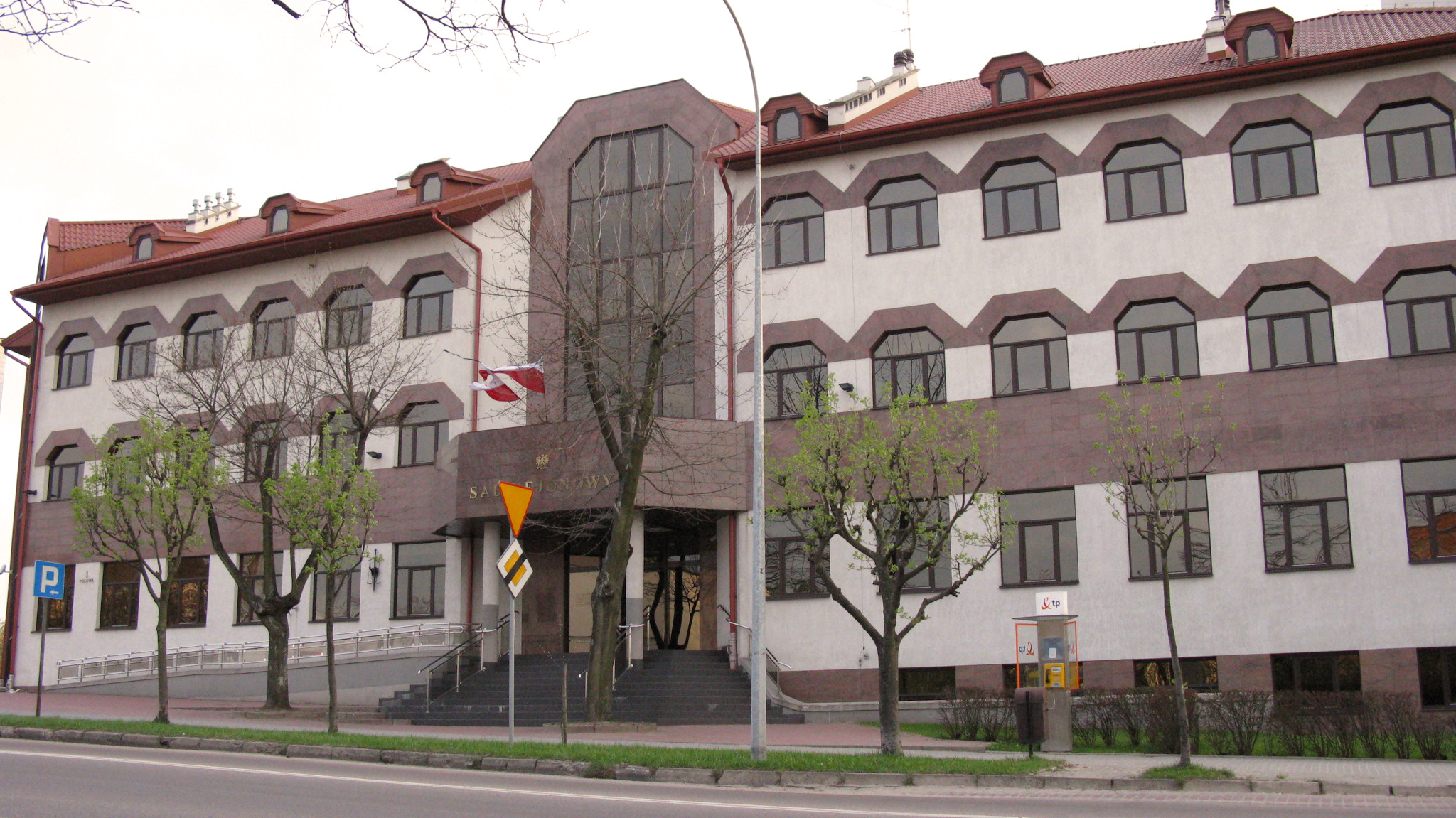 Sąd Rejonowy w Łomży